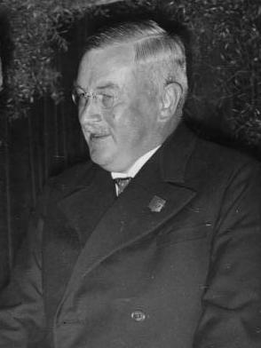 ADN-ZB / Archiv Faschistisches Deutschland 1933-1945: Internationaler Strafrechts- und Gefängniskongreß im August 1935 in der Berliner Kroll-Oper Während einer Pause im Gespräch: der deutsche Reichsminister für Justiz Dr. Gürtner (rechts) mit dem Generalsekretär Dr. J. Simon van der Aa, Professor für Strafrecht an der Universität Groningen (Niederlande).